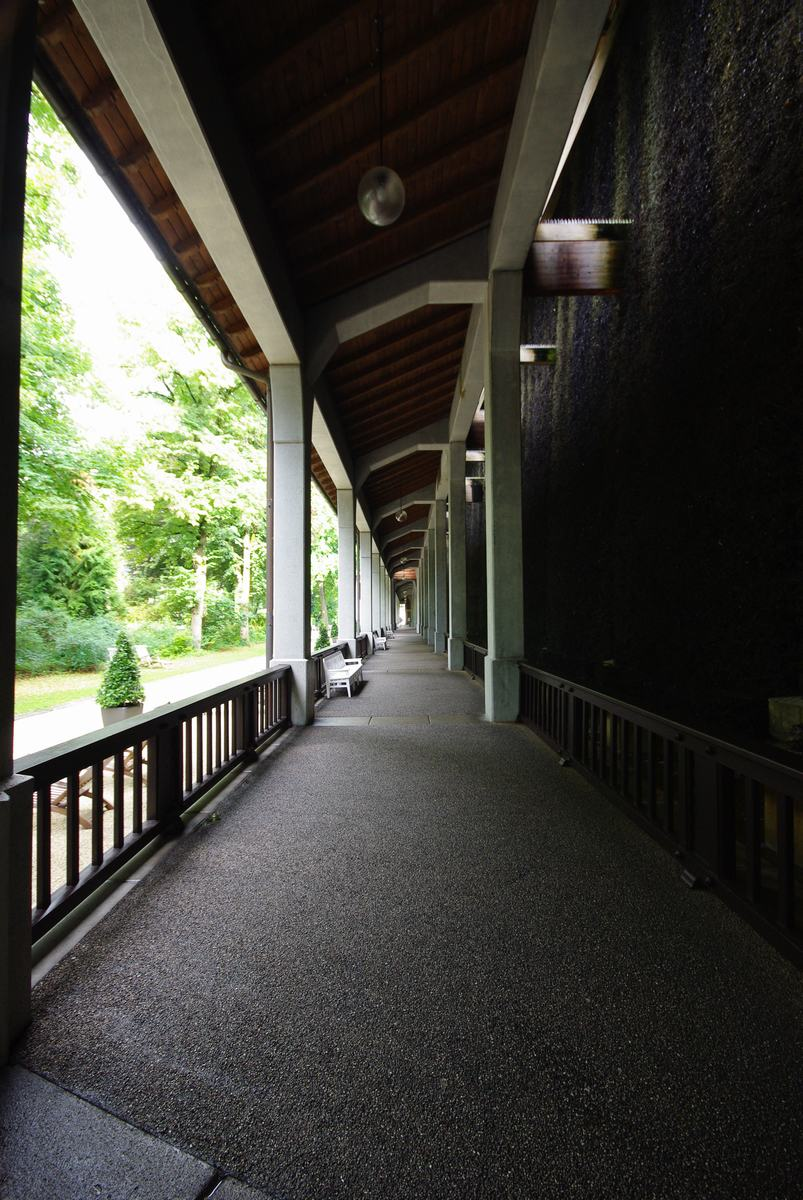 Kurstr. 6, 83435 Bad Reichenhall, Gradierhaus, WestseiteThis is a photograph of an architectural monument.